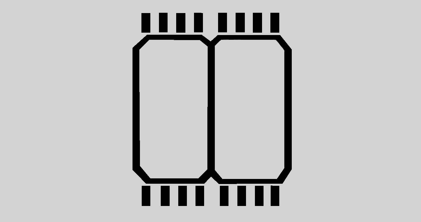 Typologie der podomorphen Petrosomatoglyphen auf Lanzarote nach Hans-Joachim Ulbrich